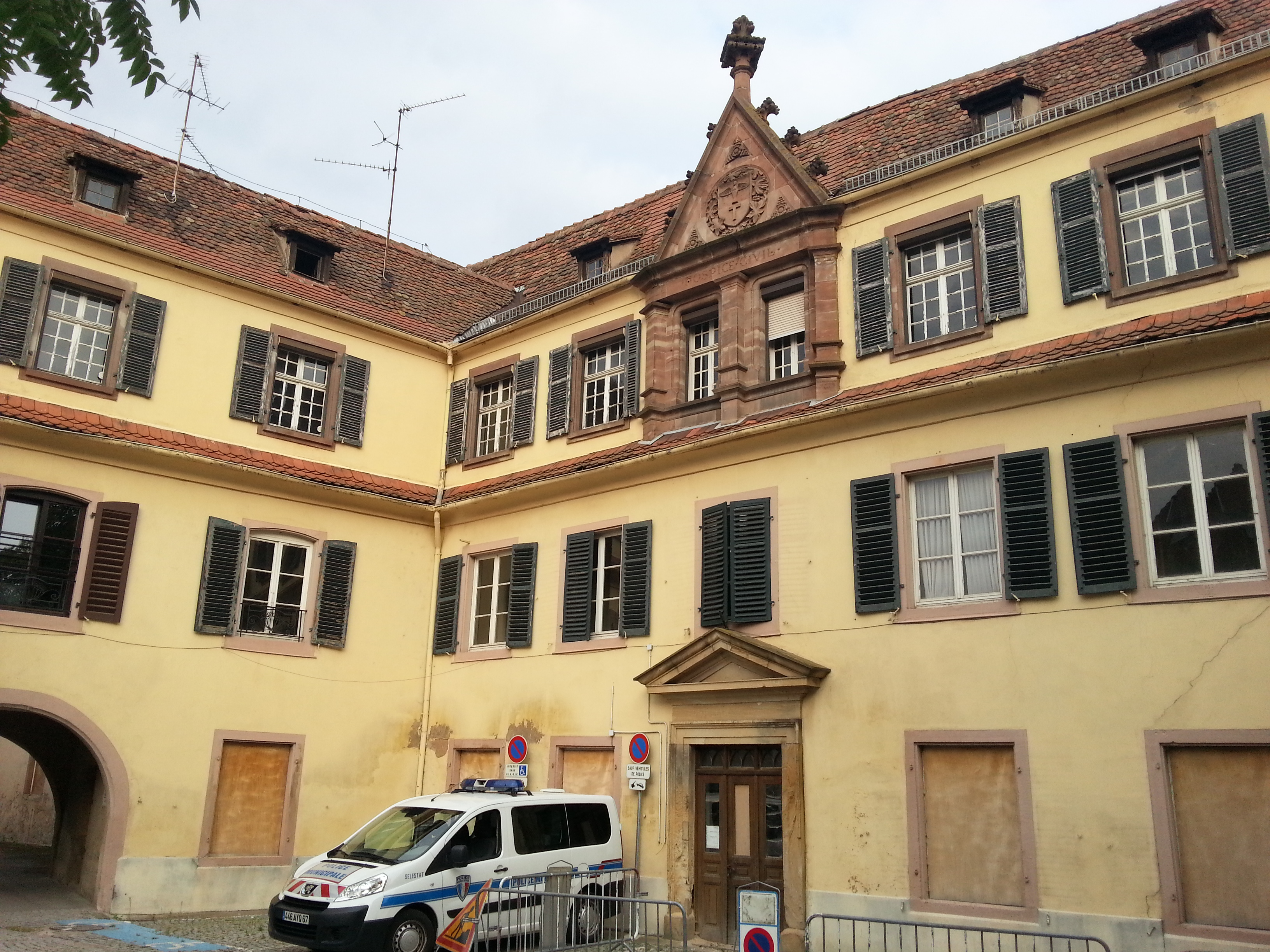 Kloster Sylo (Schlettstadt), Hospital